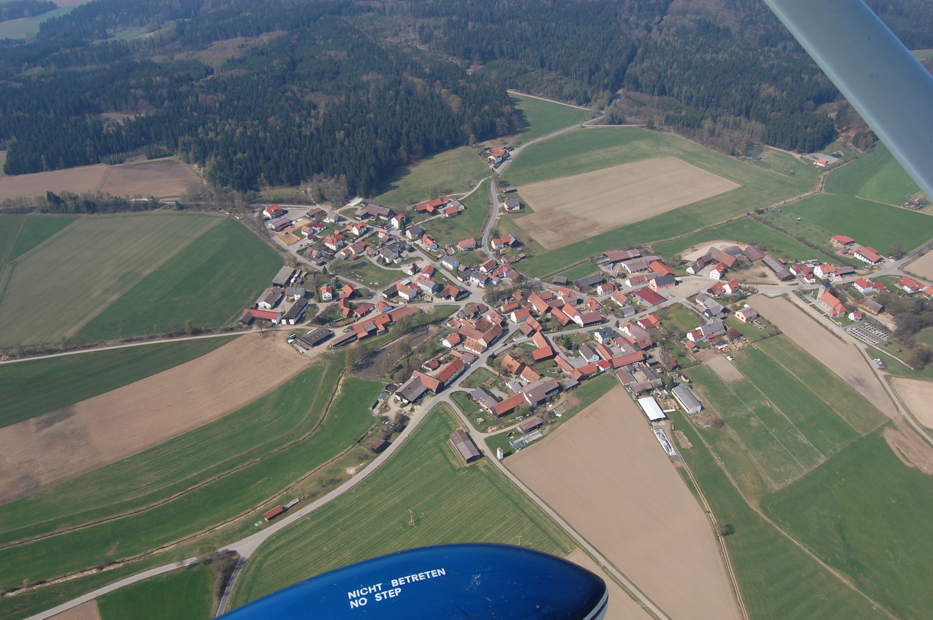 Ortschaft Kleinschwand (Markt Tännesberg) aus der Vogelperspektive (2009)